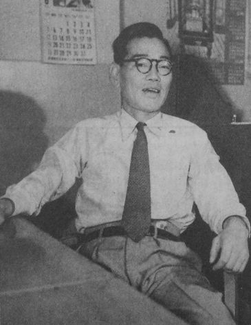 柴勝男